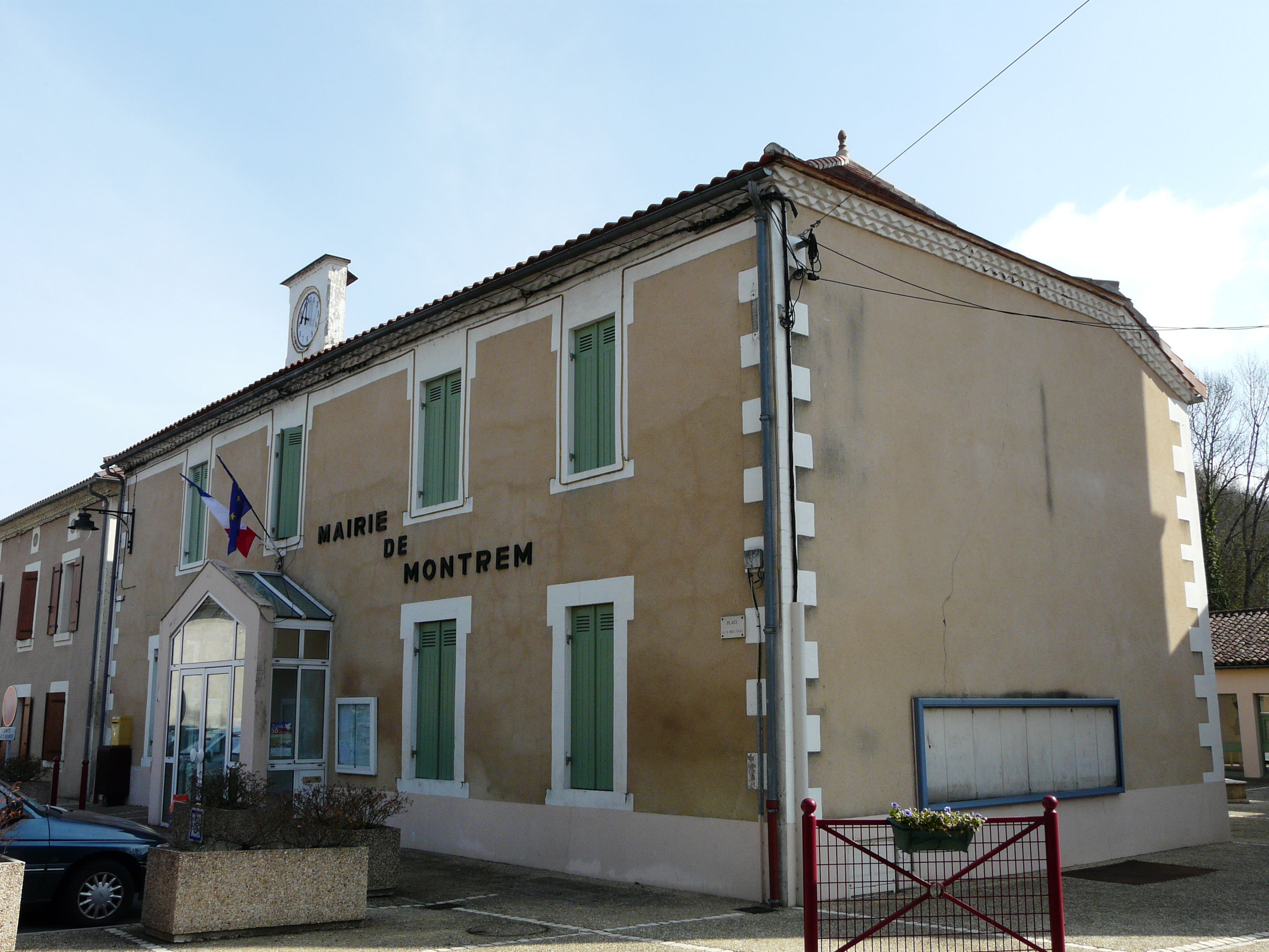 La mairie de Montrem à Montanceix, Dordogne, France.